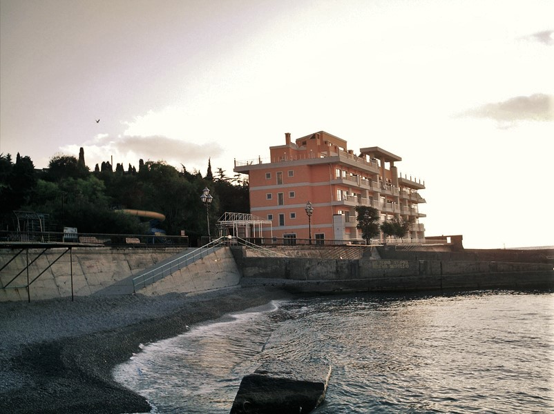 В поселке Отрадное (Ялта)